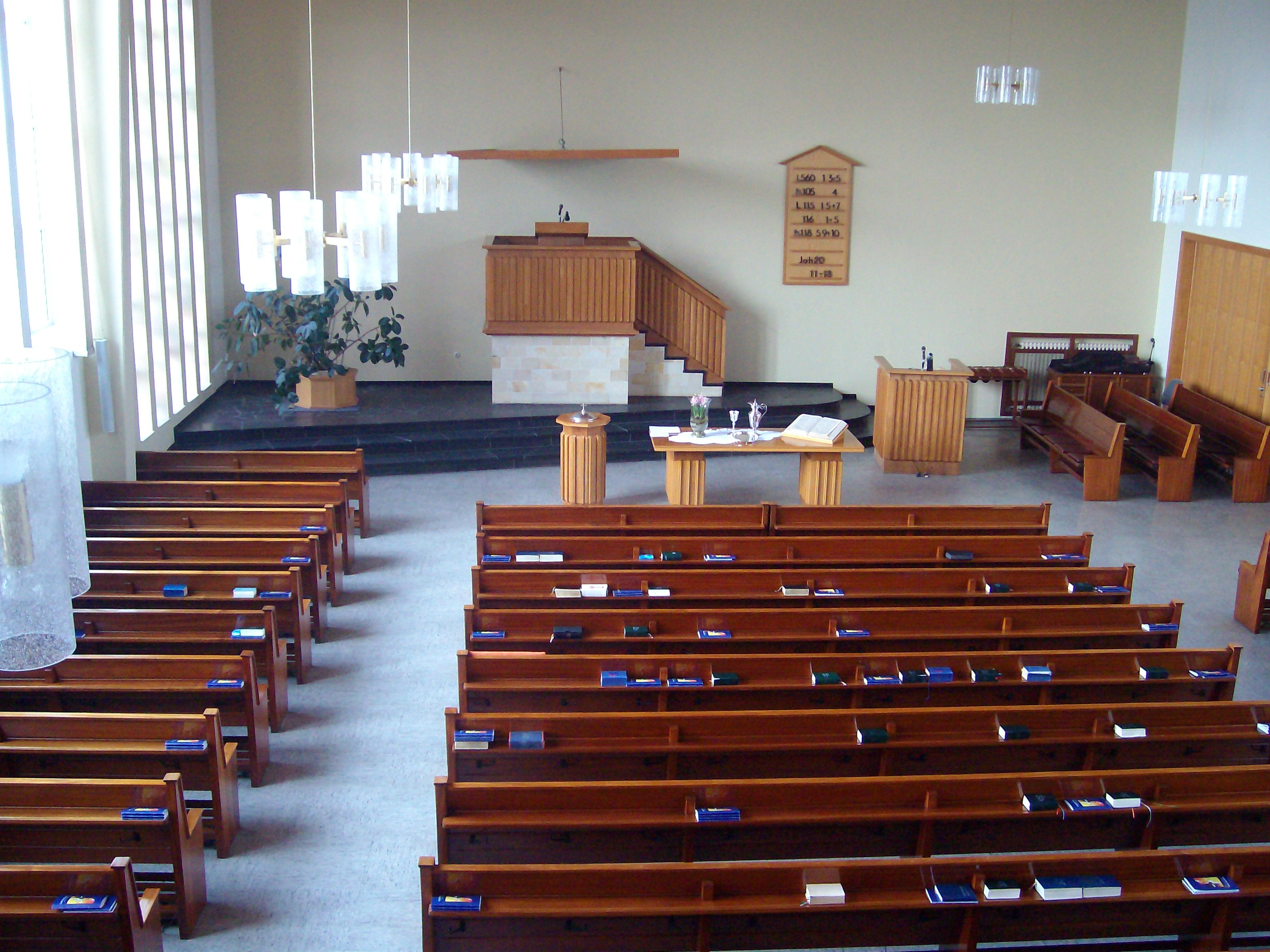 Innenraum der Evangelisch-altreformierten Kirche Bunde, Ostfriesland, Niedersachsen, Deutschland